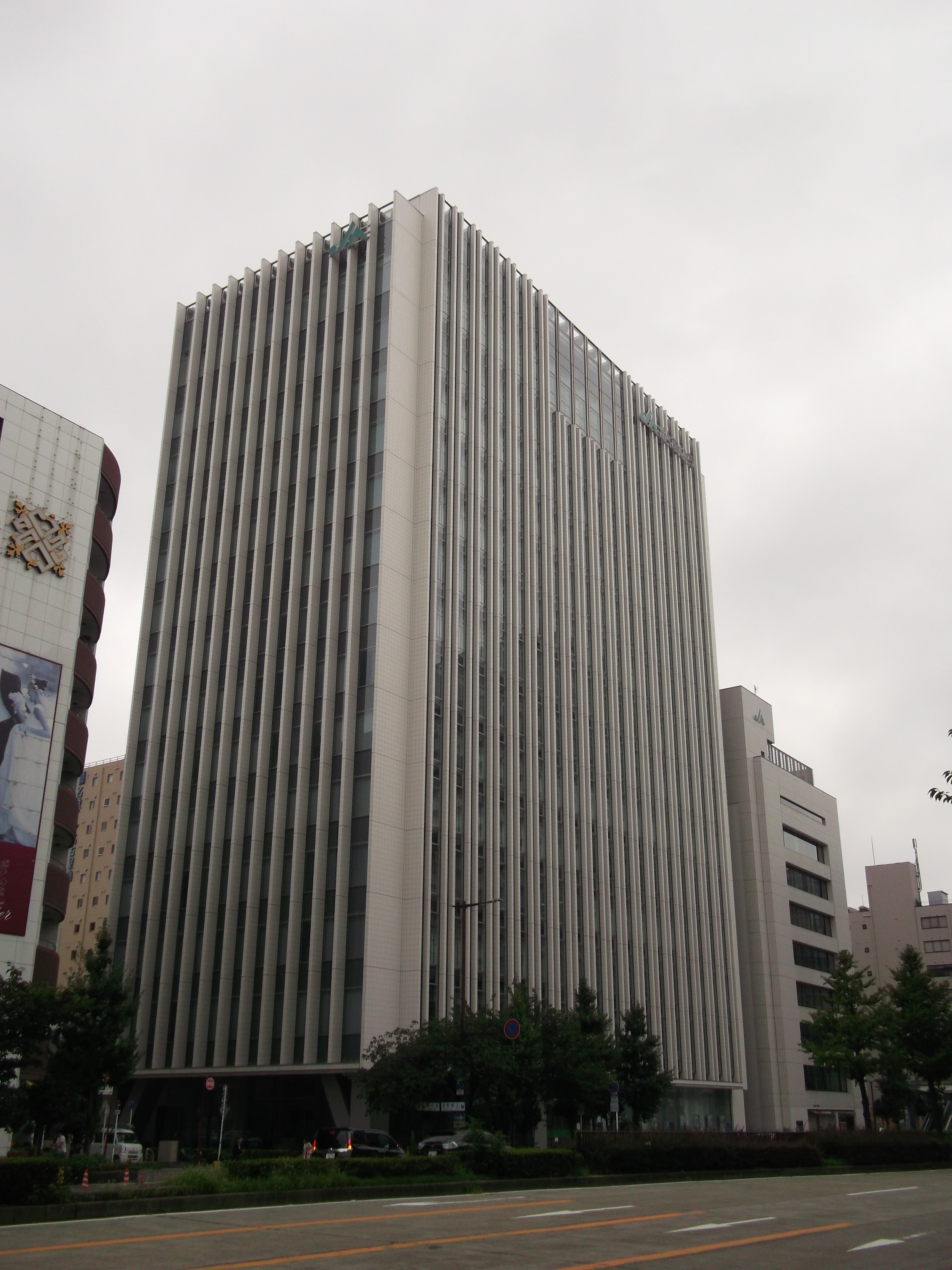 名古屋市中区のJAあいちビルを北側公道東側より撮影